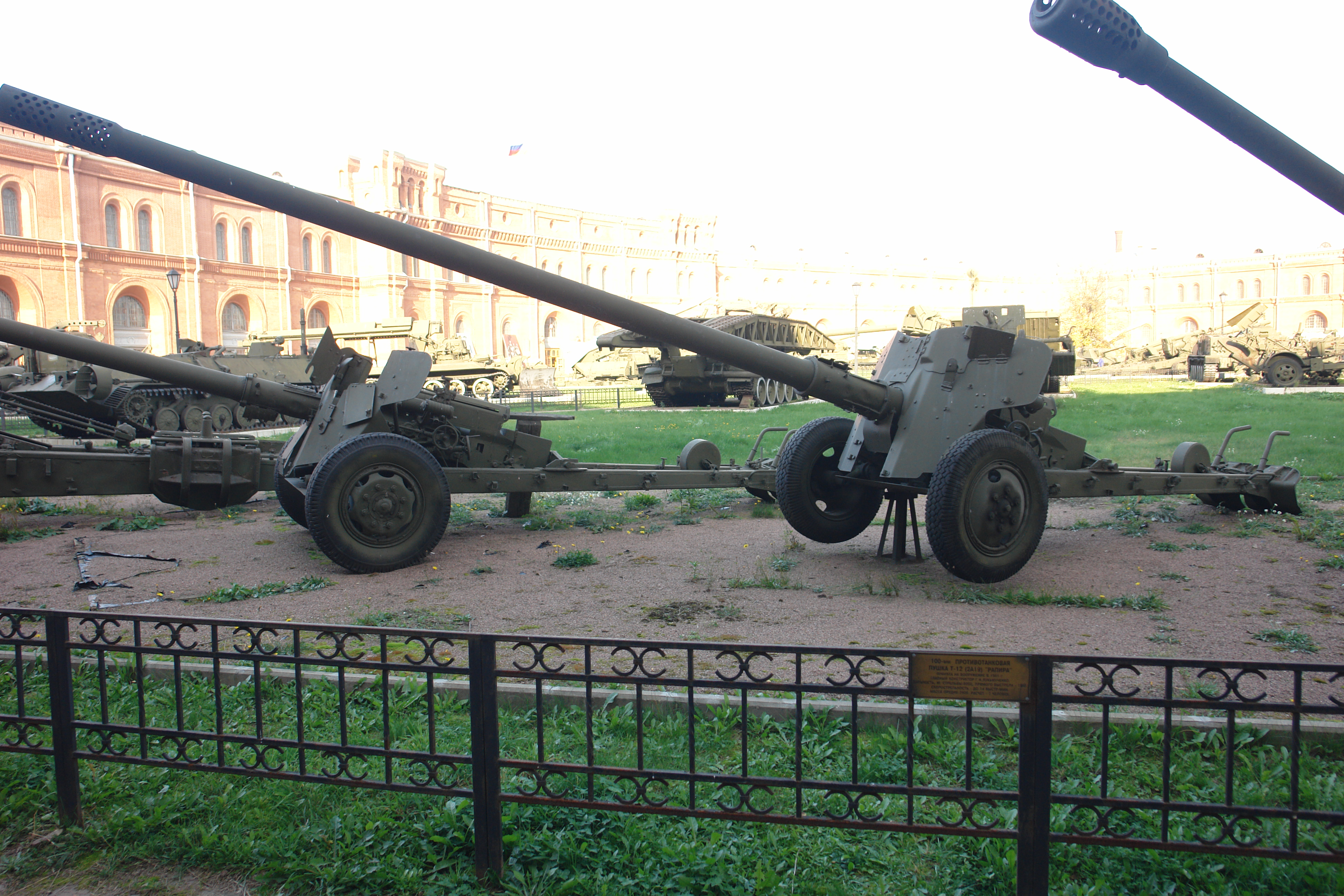 100-мм ПРОТИВОТАНКОВАЯ ПУШКА Т-12 (2А19) "РАПИРА" ПРИНЯТА НА ВООРУЖЕНИЕ В 1961 г. ГЛАВНЫЙ КОНСТРУКТОР Г.И.ЛУКЬЯНЧЕНКО. lbHOCTb, M: СТРЕЛЬБЫ-6000, ПРЯМОГО ВЫСТРЕЛ СКОРОСТРЕЛЬНОСТЬ - ДО 14 ВЫСТР/МИН. МАССА ОРУДИЯ-2800. РАСЧЕТ - 7 ЧЕЛОВЕК. Военно-исторический музей артиллерии, инженерных войск и войск связи, Санкт-Петербург.